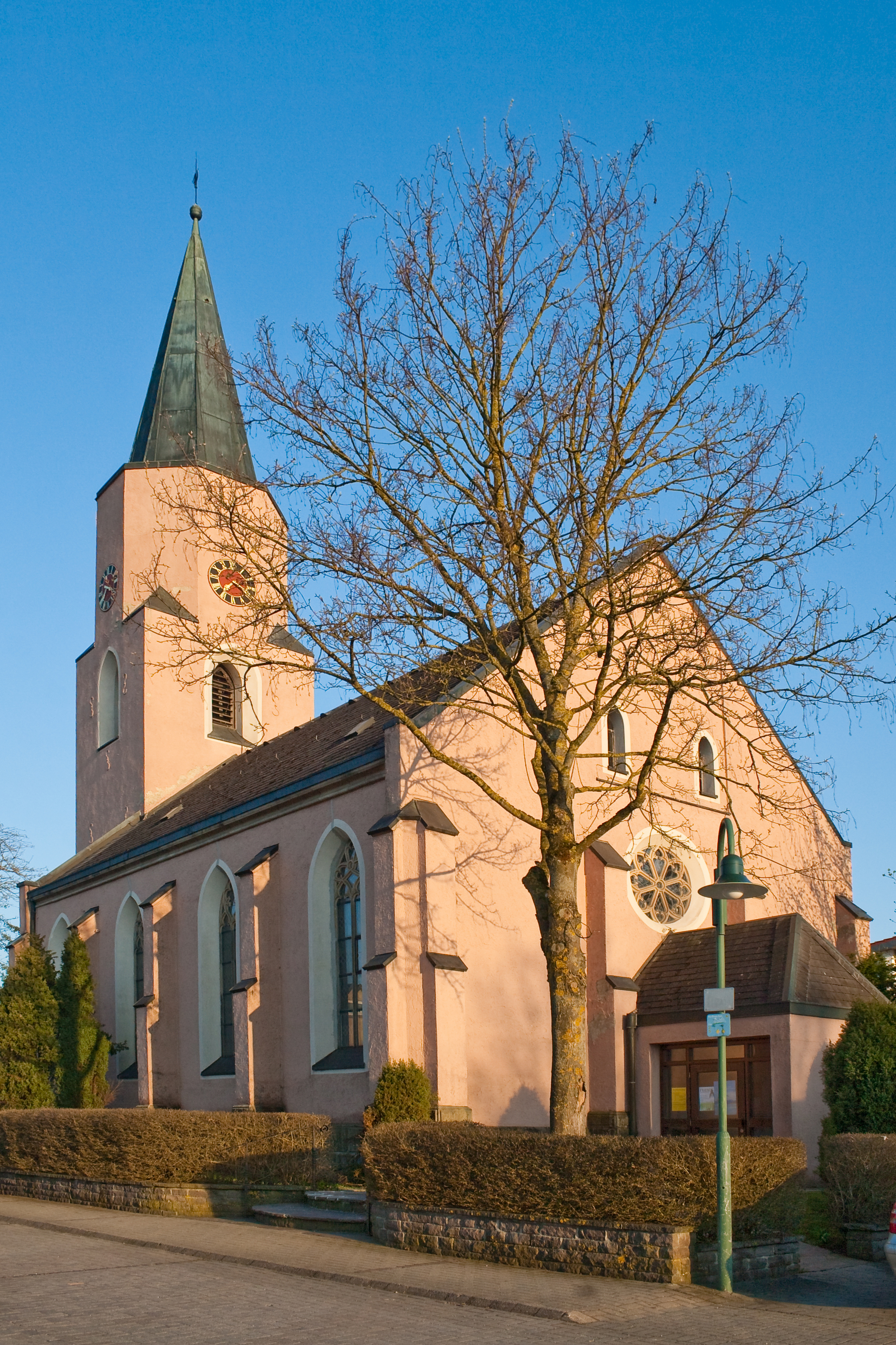 Urspring, Lonsee, Baden-Württemberg, Germany